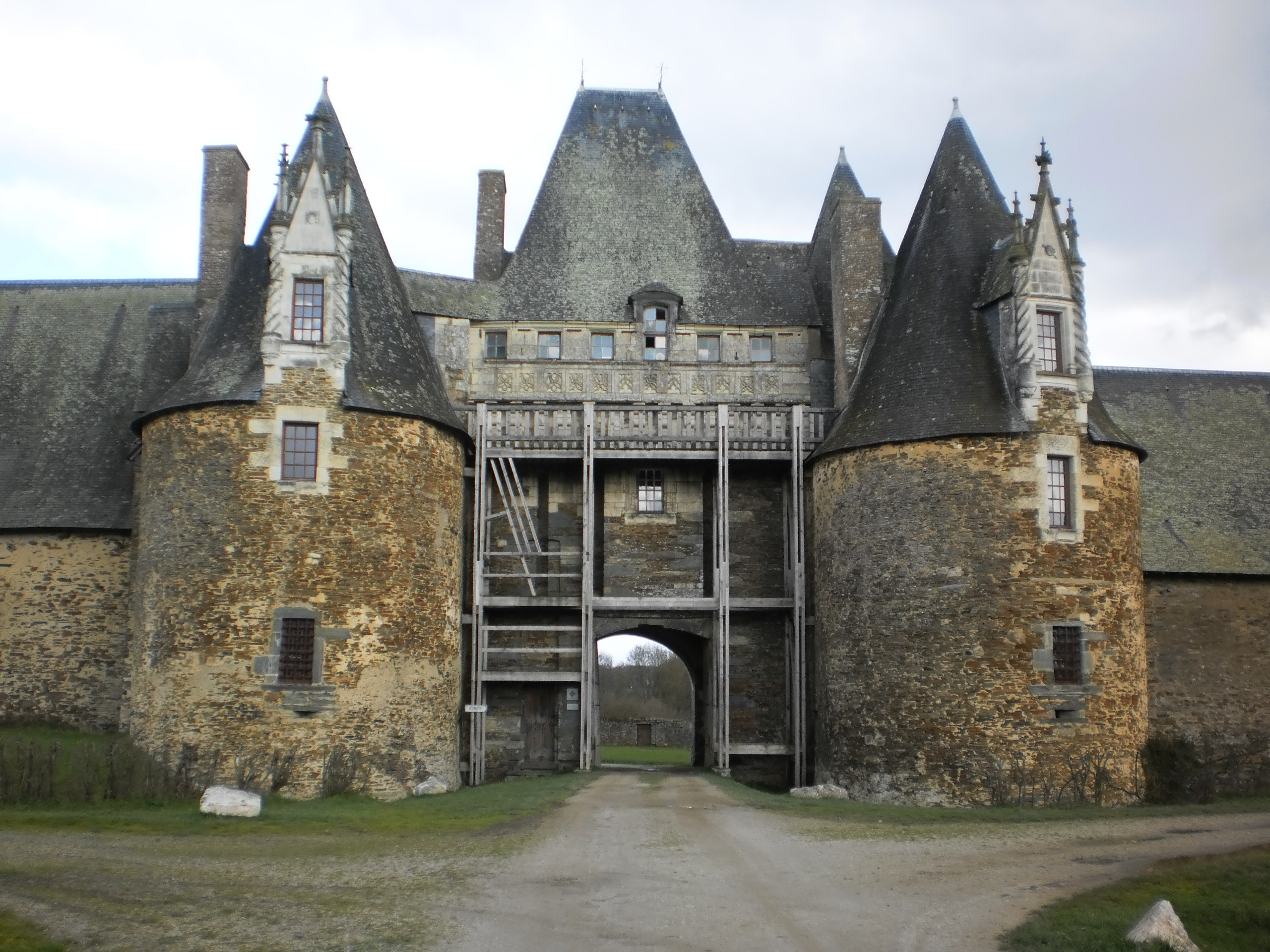 La Chapelle-Glain (Loire-Atlantique, France) - La Motte-Glain (entrée)